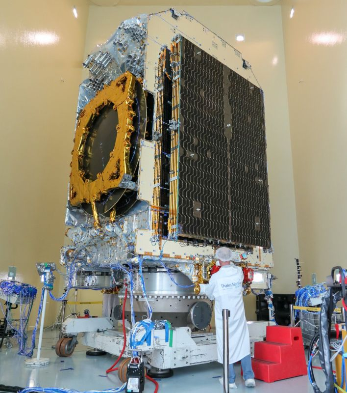 Satellite Konnect en essai dans la chambre acoustique du Centre spatial de Cannes Mandelieu